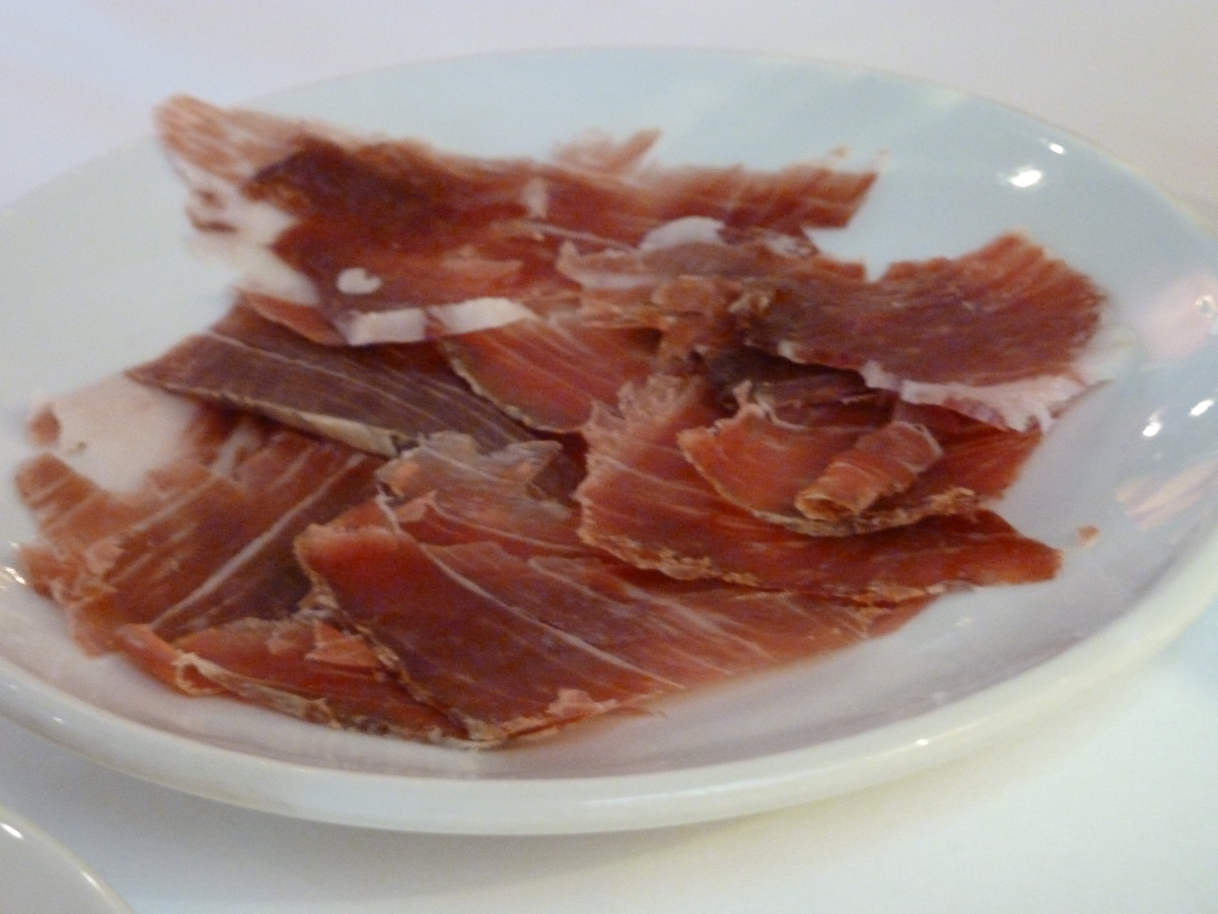 Un plato de jamón.